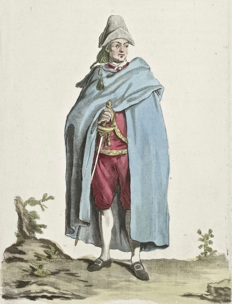 Félix Mixelle (1763–1837) nach Claude-Louis Desrais (1746–1816)/Jacques Grasset de Sant-Sauveur (1757–1810)): Andalusier. Aus: "Costumes civils actuels de tous les peuples connus", Paris 1784–1788, Abb. 200. Bibliothèque nationale de France.